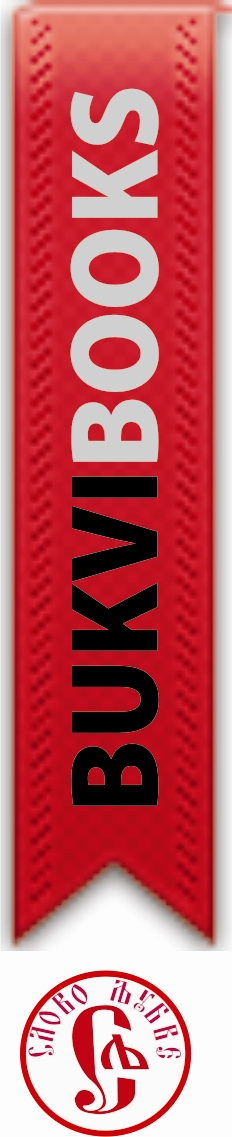 Лого на издавачката куќа Слово љубве и НВО Буквибукс од Скопје